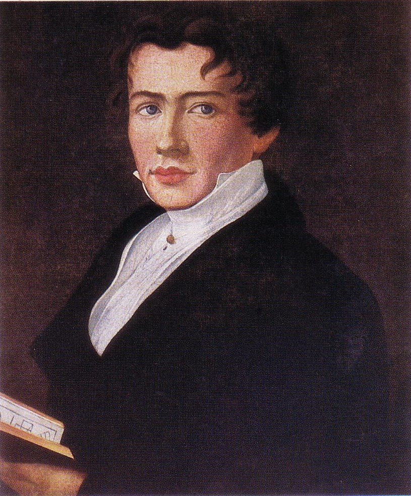 Porträt von Benjamin leopold Steinfurt, Königsberg i. Pr.